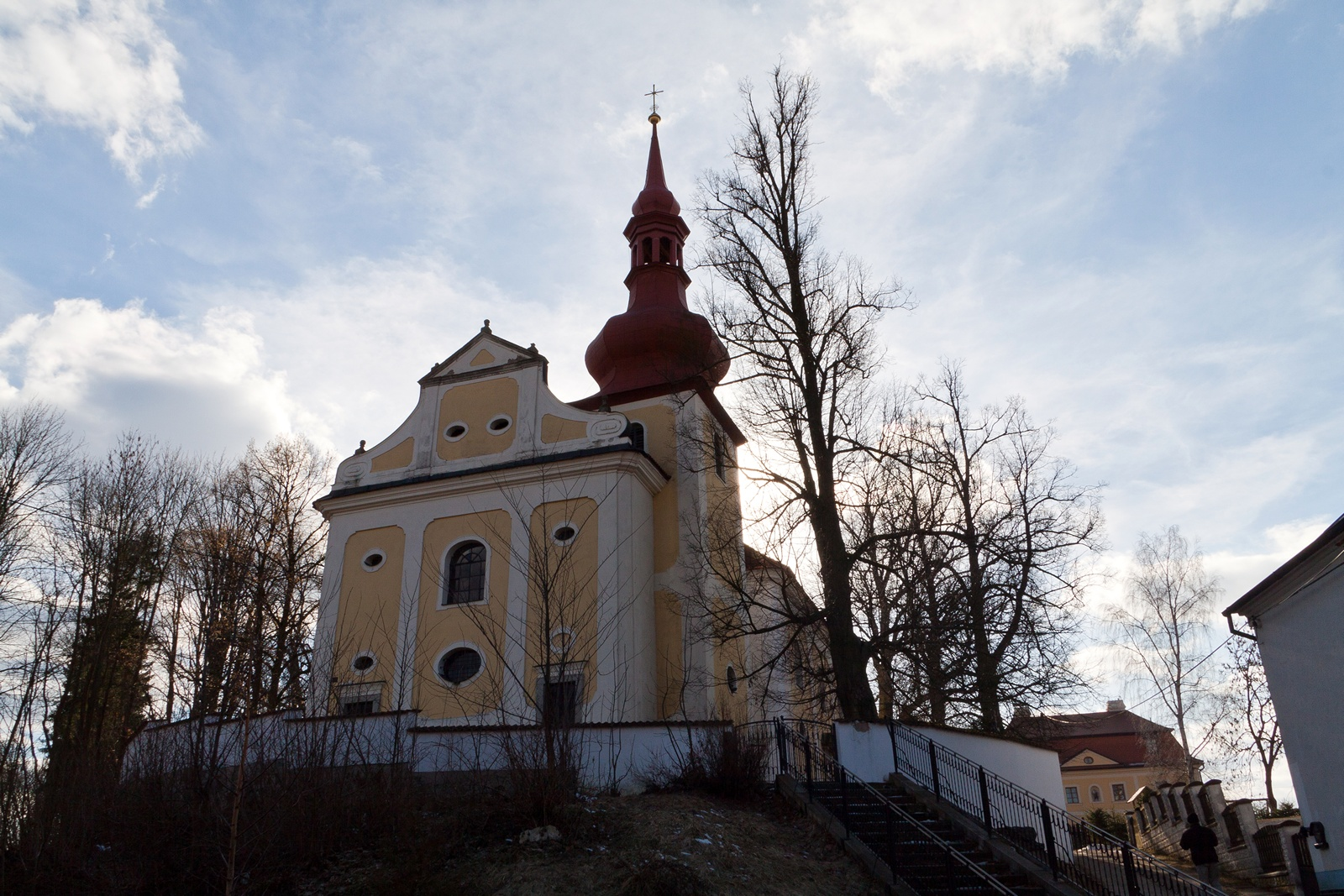 Kostel sv. Jana Nepomuckého (Staré Sedliště), Staré Sedliště